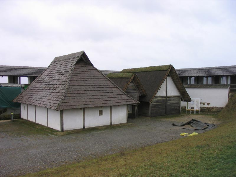 Heuneburg Freilichtmuseum GNU FDL Selbstfotografiert Kategorie:Bild:Gebäude